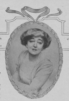 Claude Ferval, portrait publié dans la revue Gil Blas en janvier 1912, article M.E. Duchenne, La baronne de Pierrebourg, (BNF Gallica)